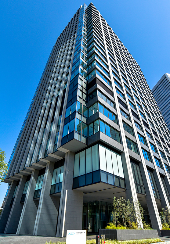 ケイ・オプティコムビル